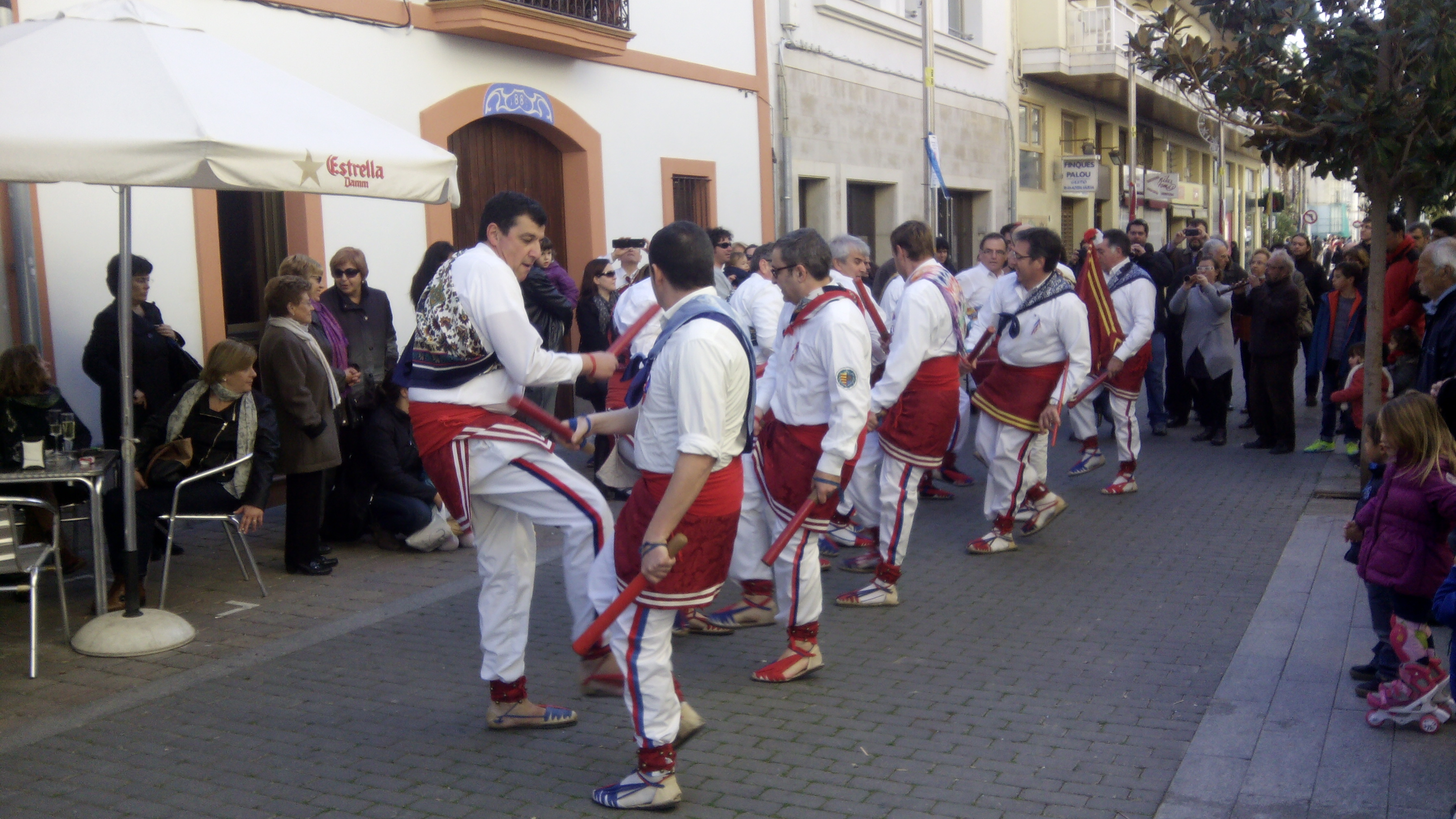 Estrena del ball "el carrer Nou" pel ball de bastons de Sant Pere de Ribes